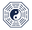 Diagrama del Pa Kua o Bagua